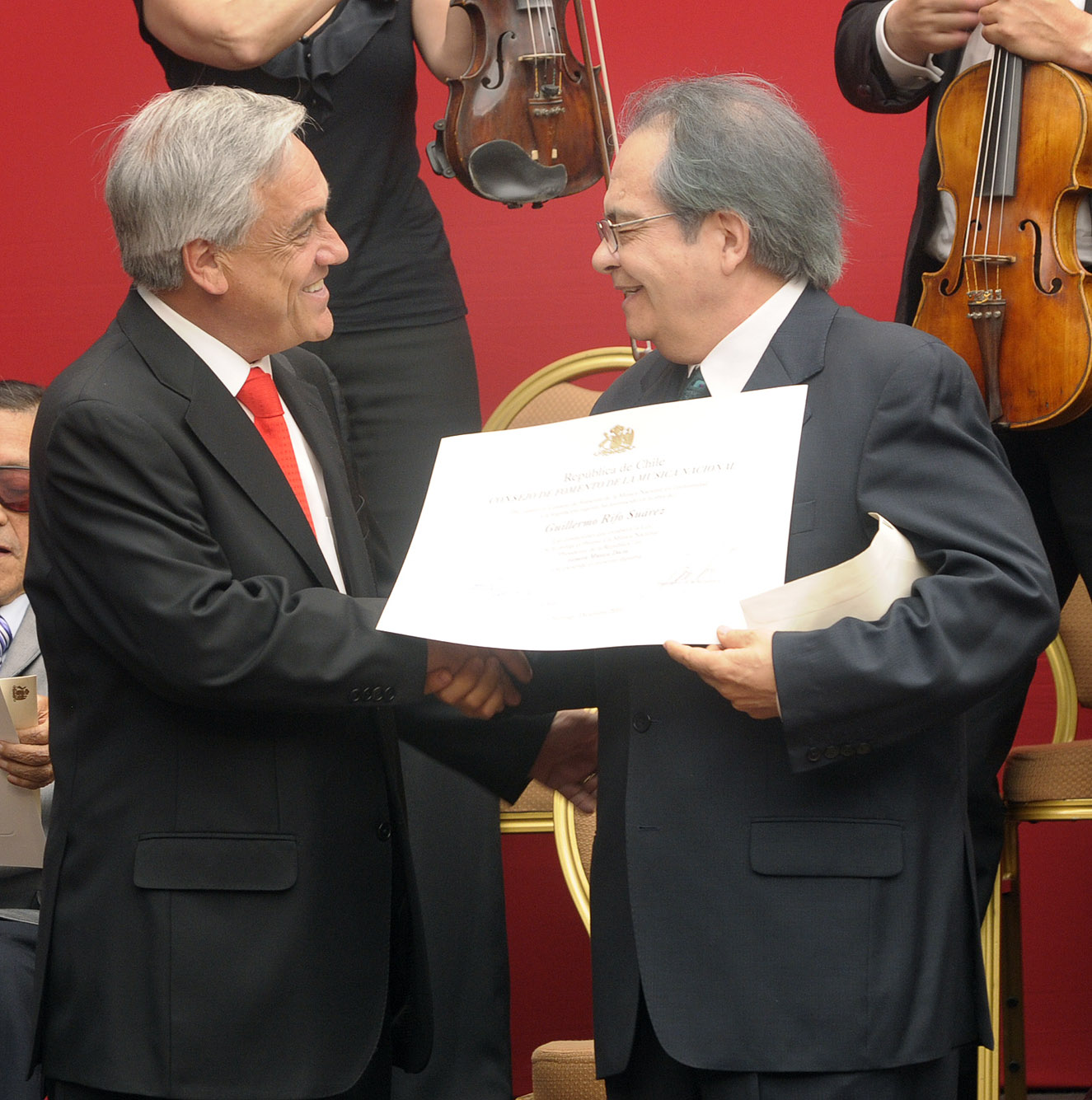 En una ceremonia realizada en el Palacio de La Moneda, el Presidente Piñera anunció el envío al Congreso en los próximos días de un proyecto de ley “que va a hacer permanente la entrega de incentivos económicos para aquellas radios u otros medios de comunicación que difundan la música chilena”.